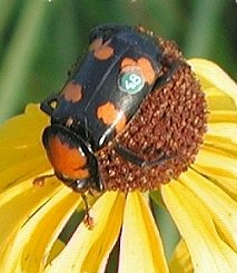 Amerikanischer Totengräber (Nicrophorus americanus) public domain